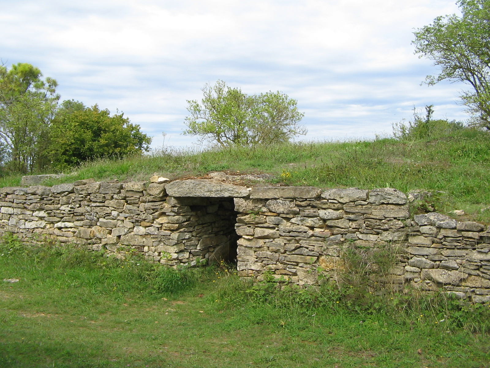 Le tumulus de Sainte Soline (79) en Août 2011